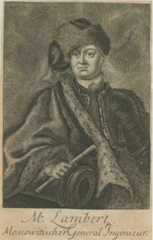 Joseph-Gaspard Lambert, Ingénieur au service du Tsar Pierre le Grand